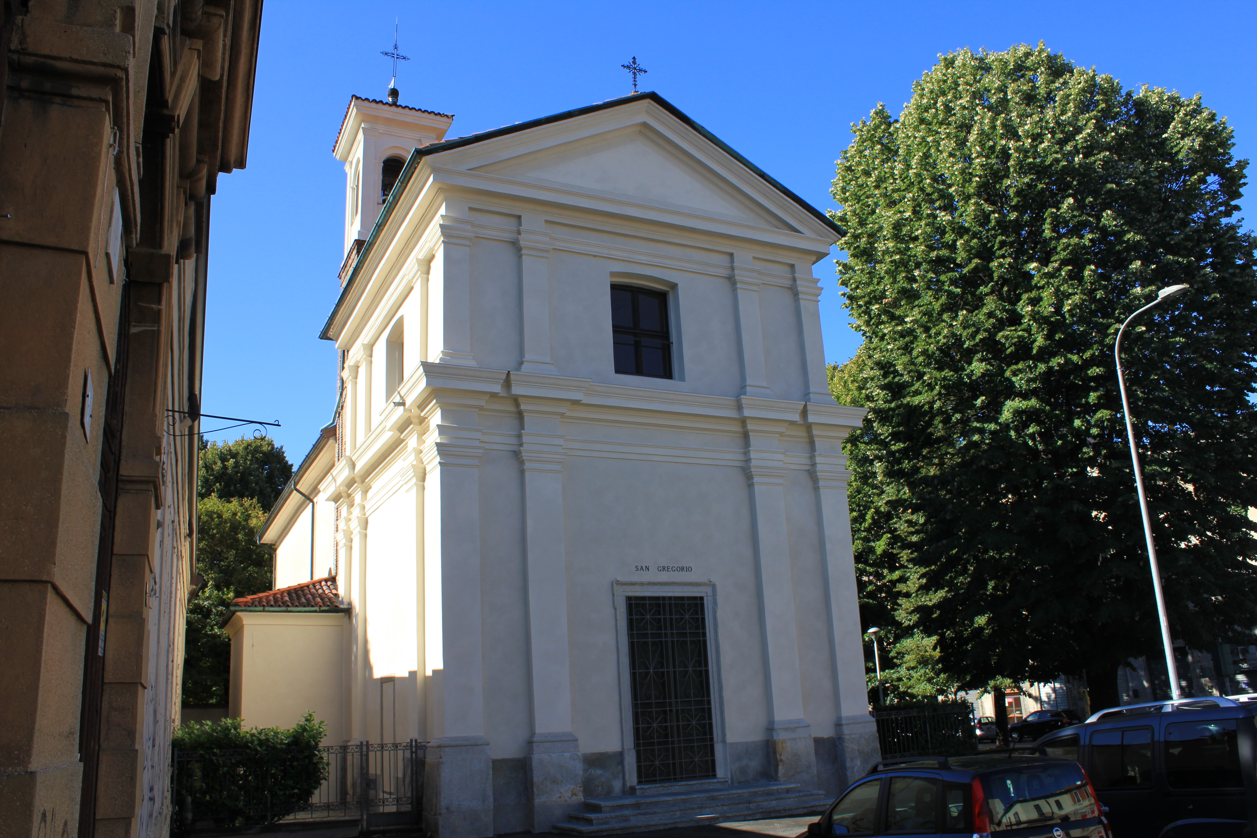 chiesa di san Gregorio - Busto Arsizio